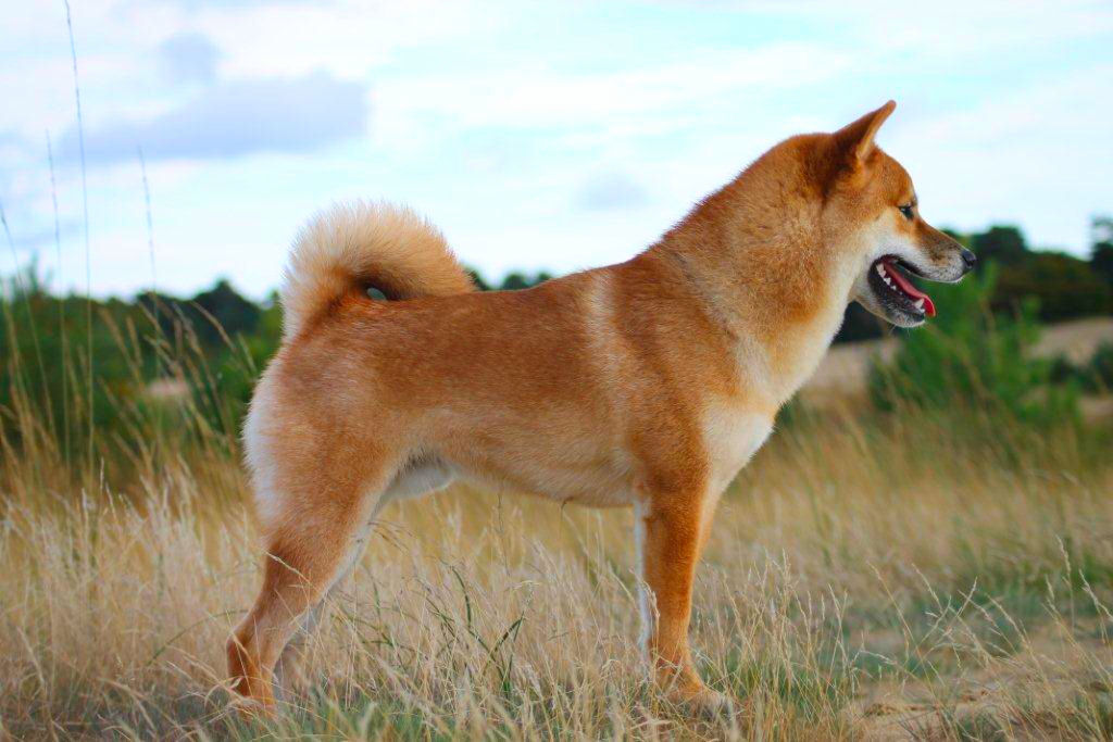 Shiba, Chiko 9 Months